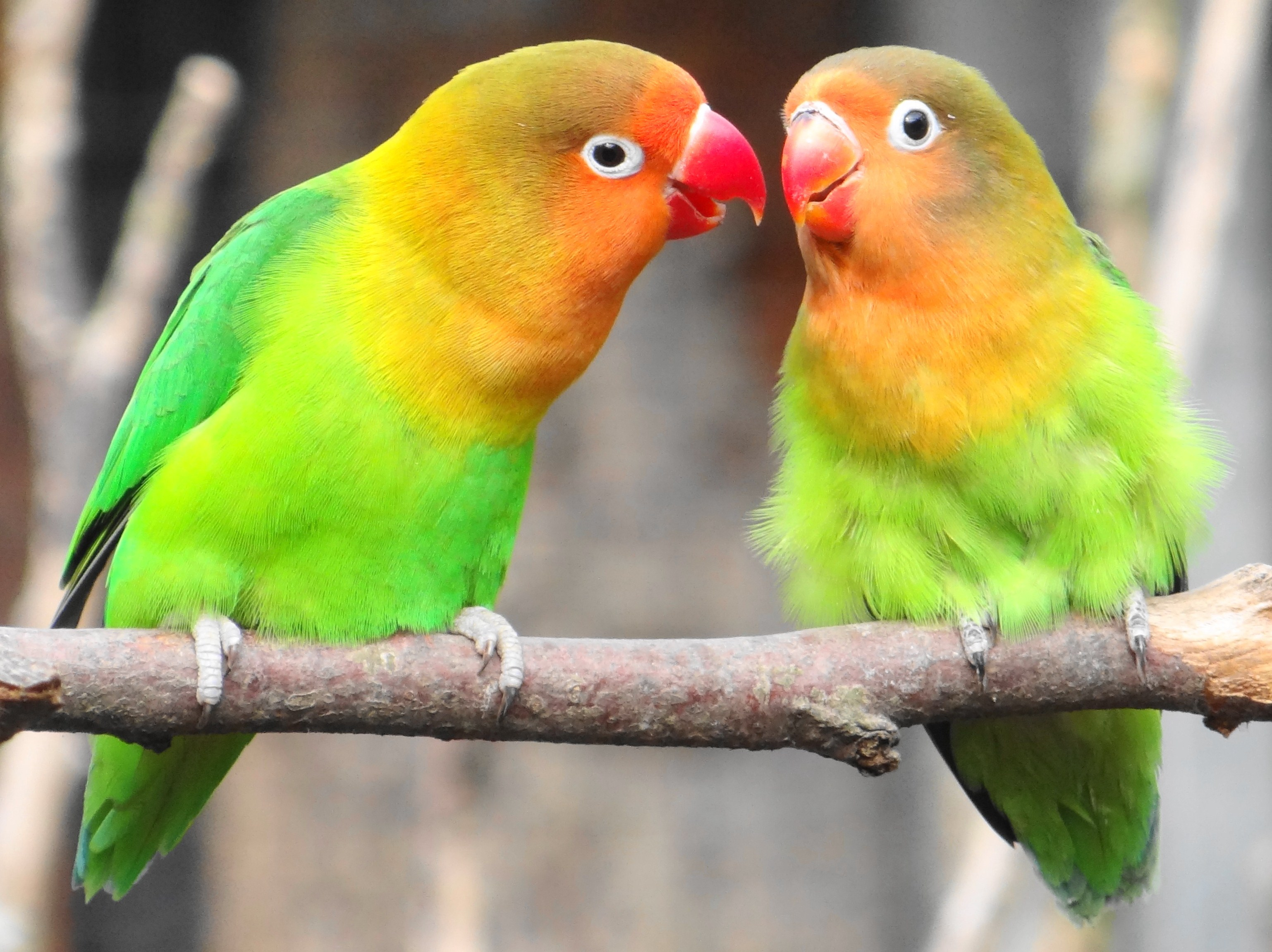 Couple d'inséparables au parc de Villard les Dombes